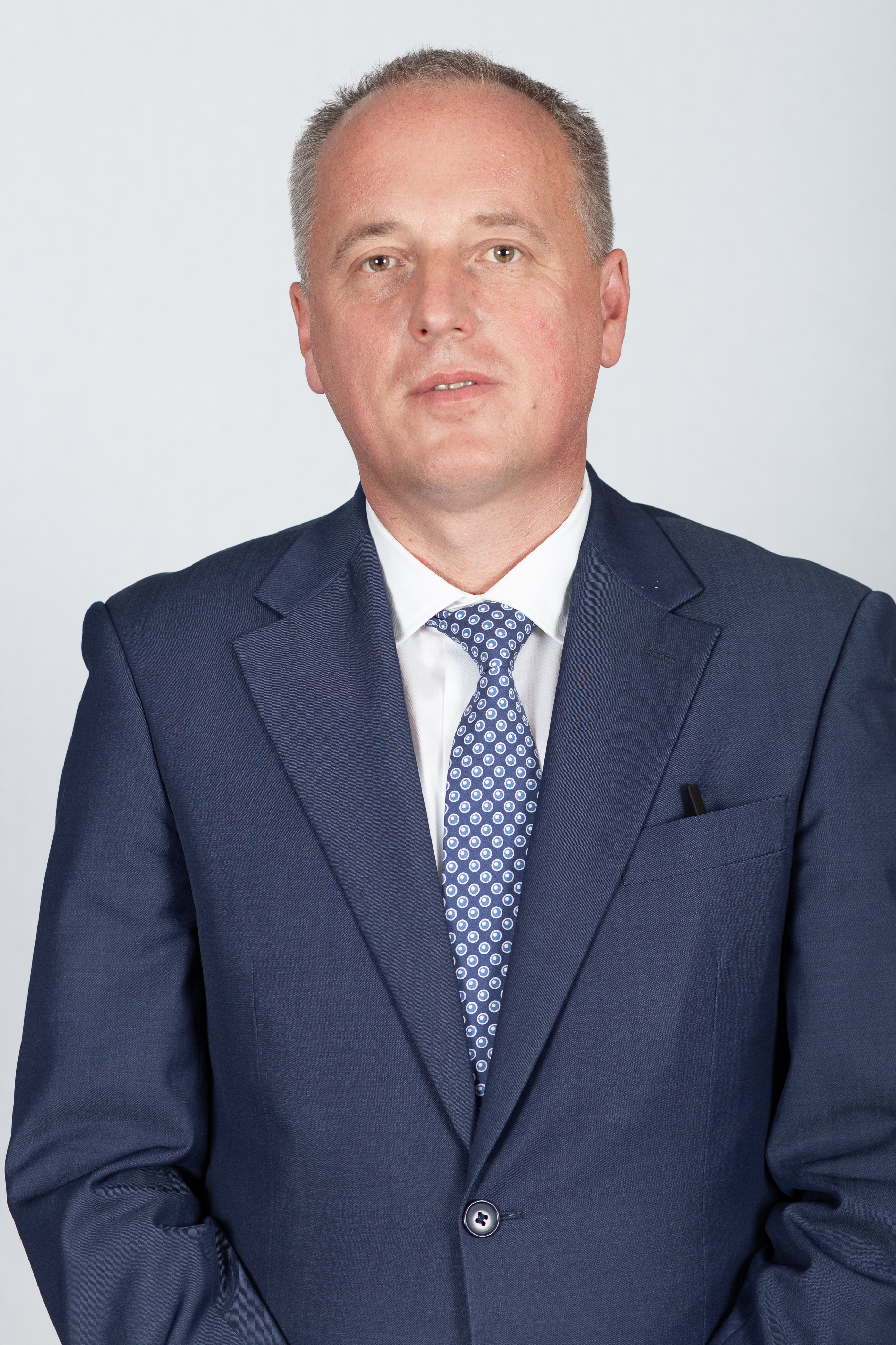 Rüdiger Erben, MdL Sachsen-Anhalt, SPD